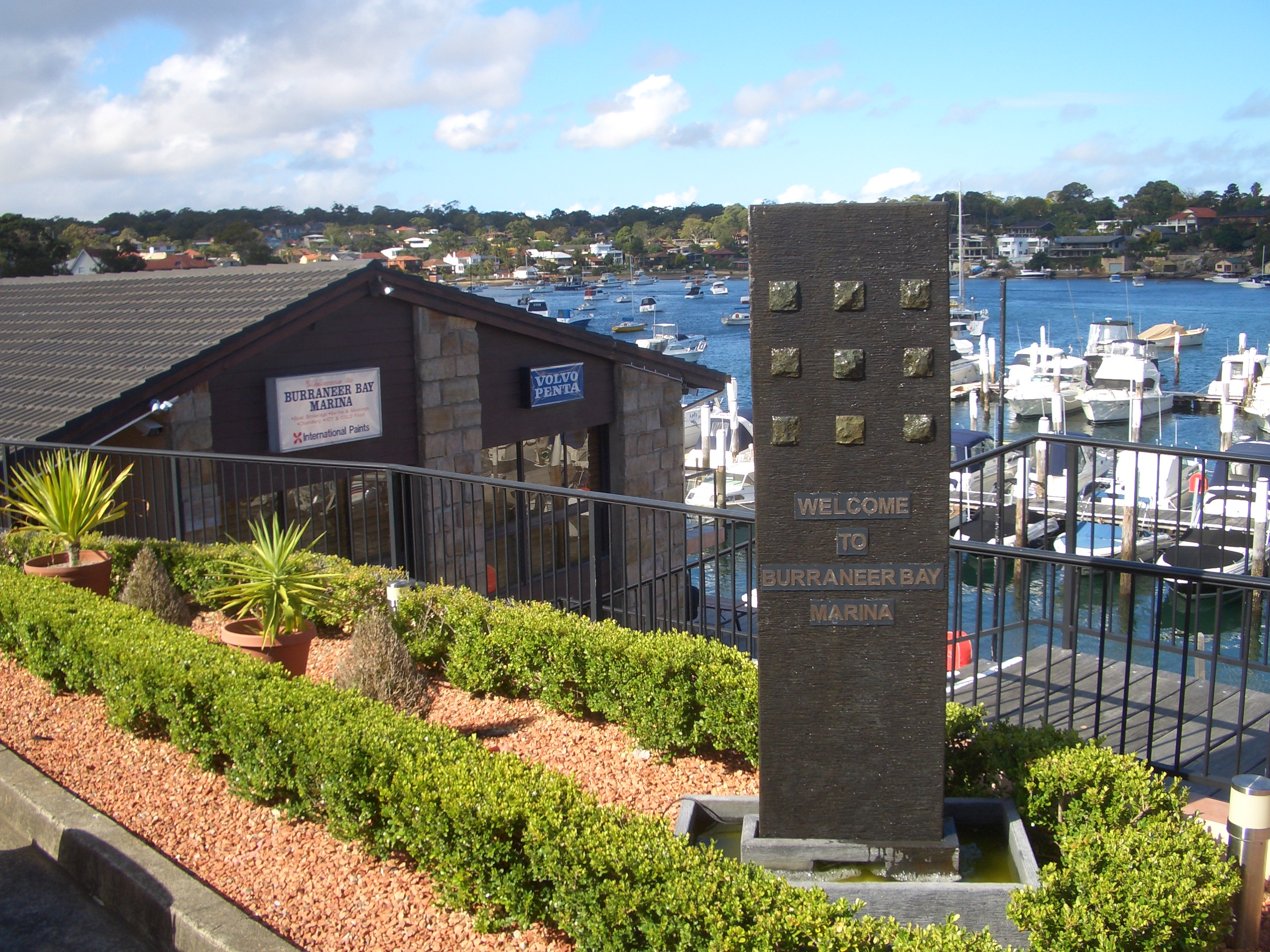 Burraneer Bay marina